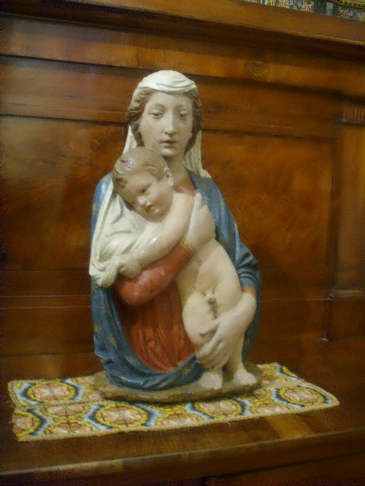 Luca della Robbia workshop, Madonna con bambino, Santa Felicita church in Florence, sala capitolare.